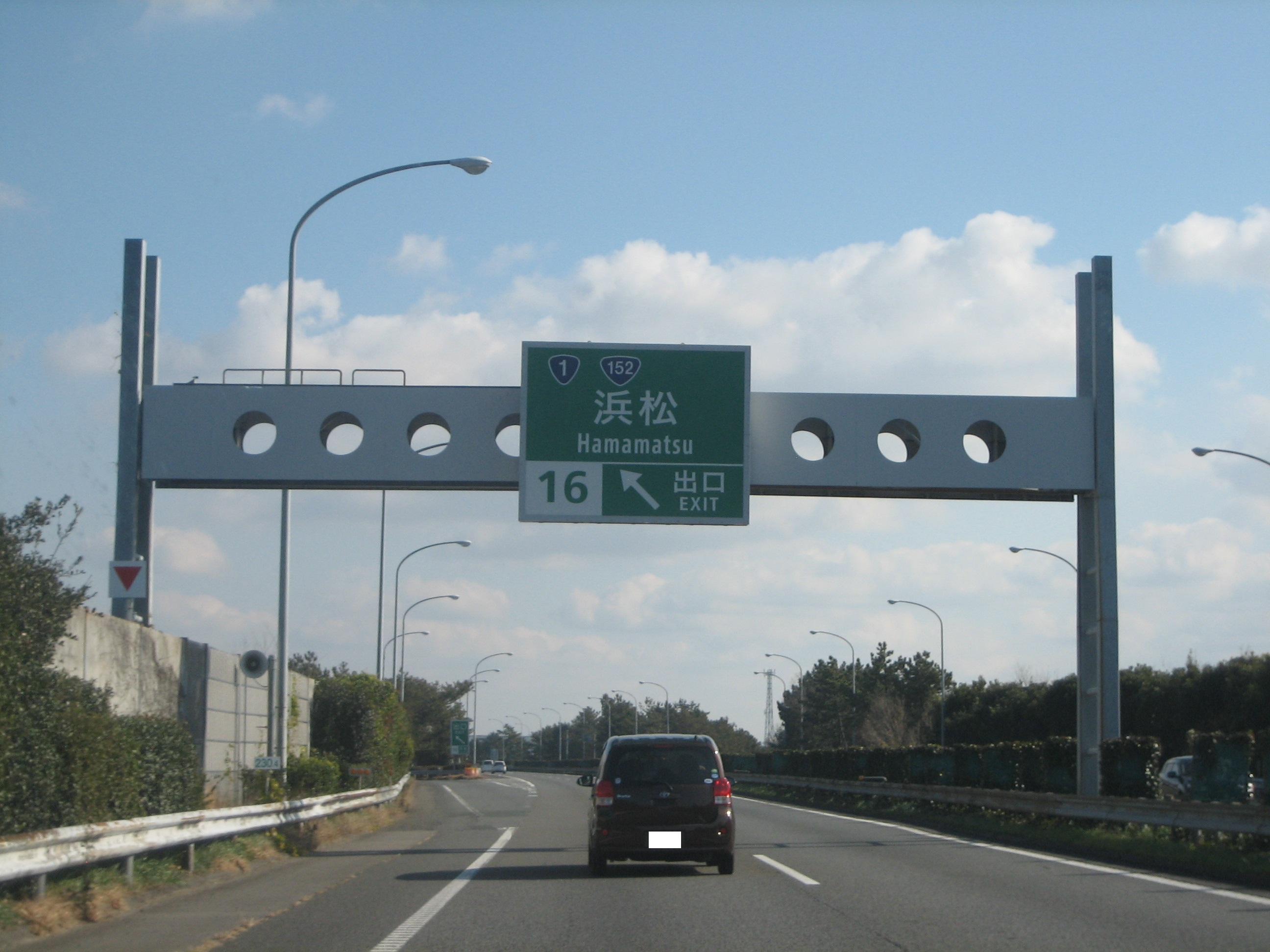 浜松IC